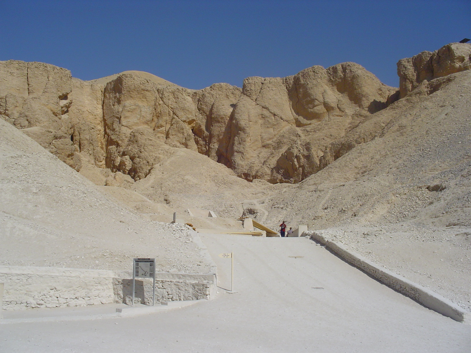 EGIPTO - VALE DOS REIS